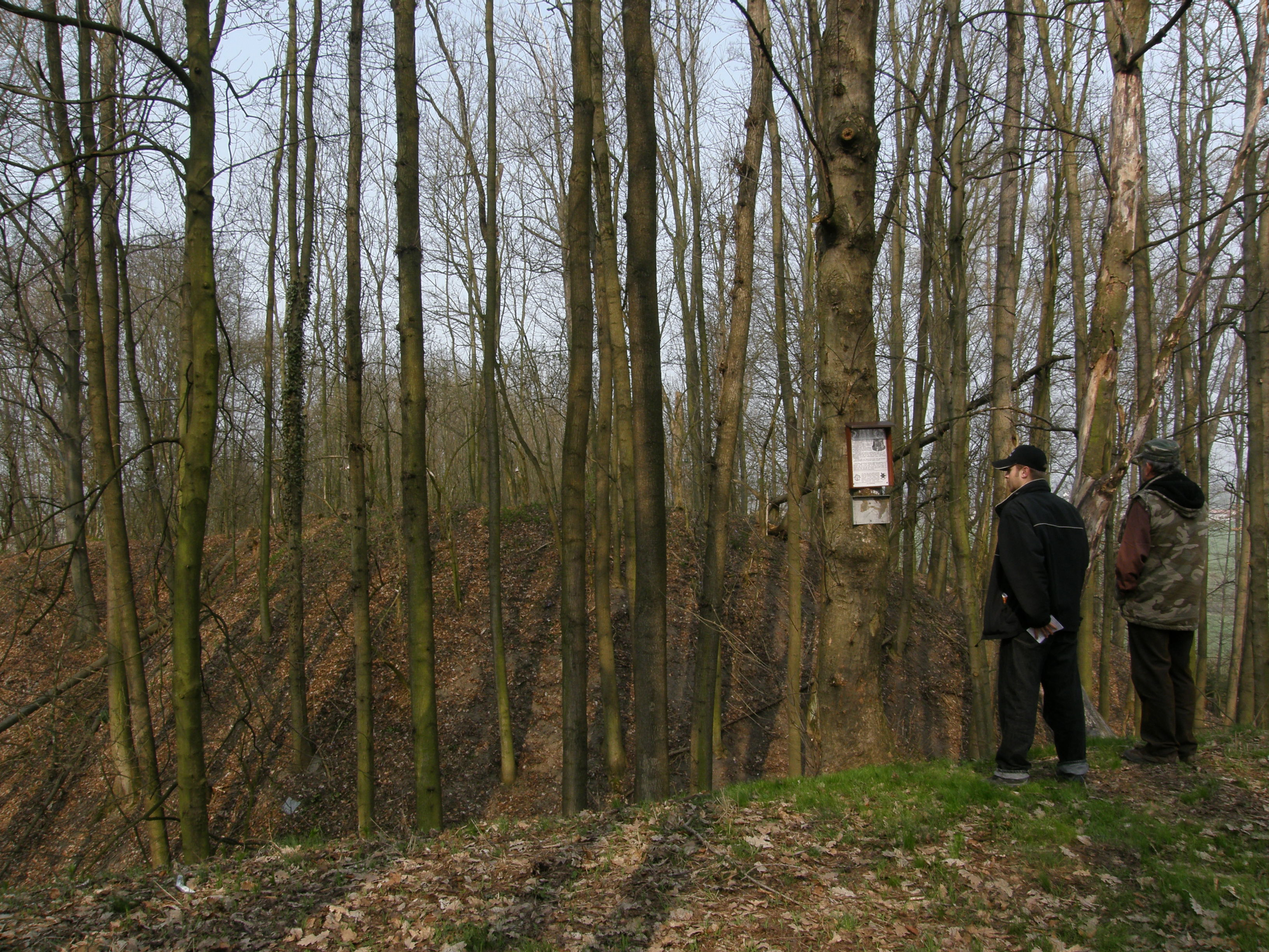 Hrad - hrádek Vražba, zbytky hradu Rotemberk, tvrziště Habřina, archeologické stopy (Habřina), na návrší nad potokem, Habřina